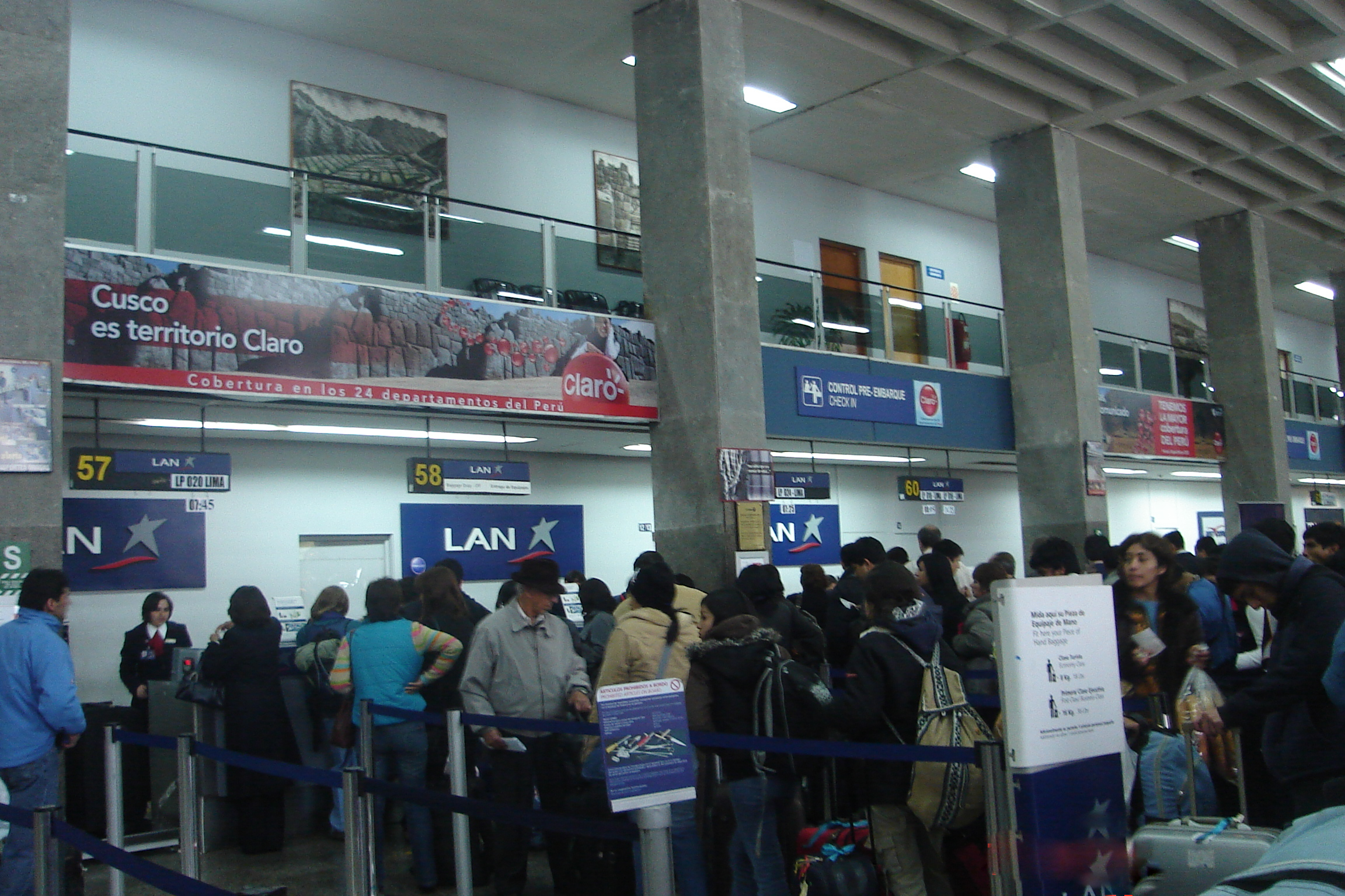 Zona de preembarque en el Aeropuerto de Cusco